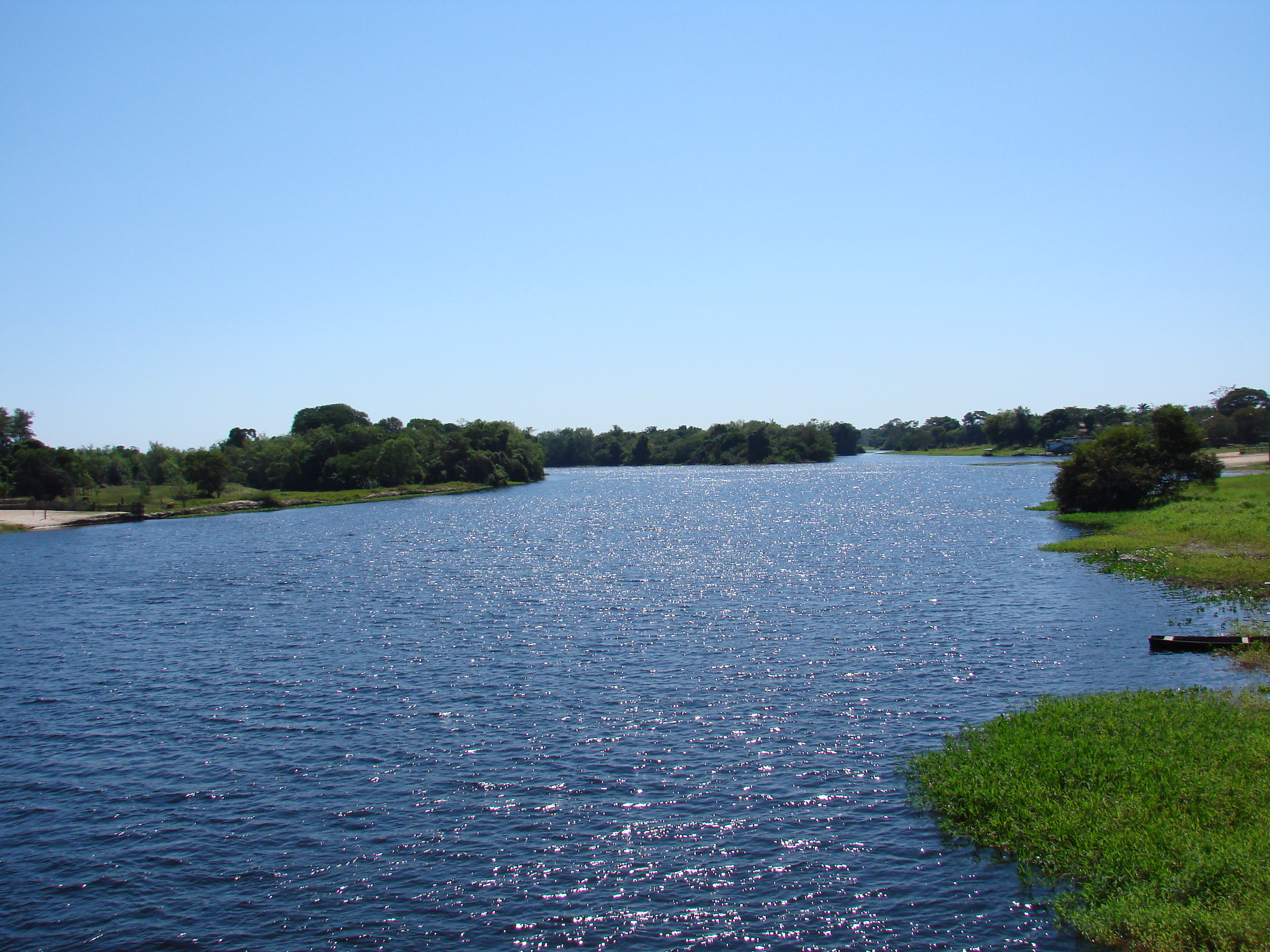 Rio Guaporé, passando pela cidade de Pontes e Lacerda-MT